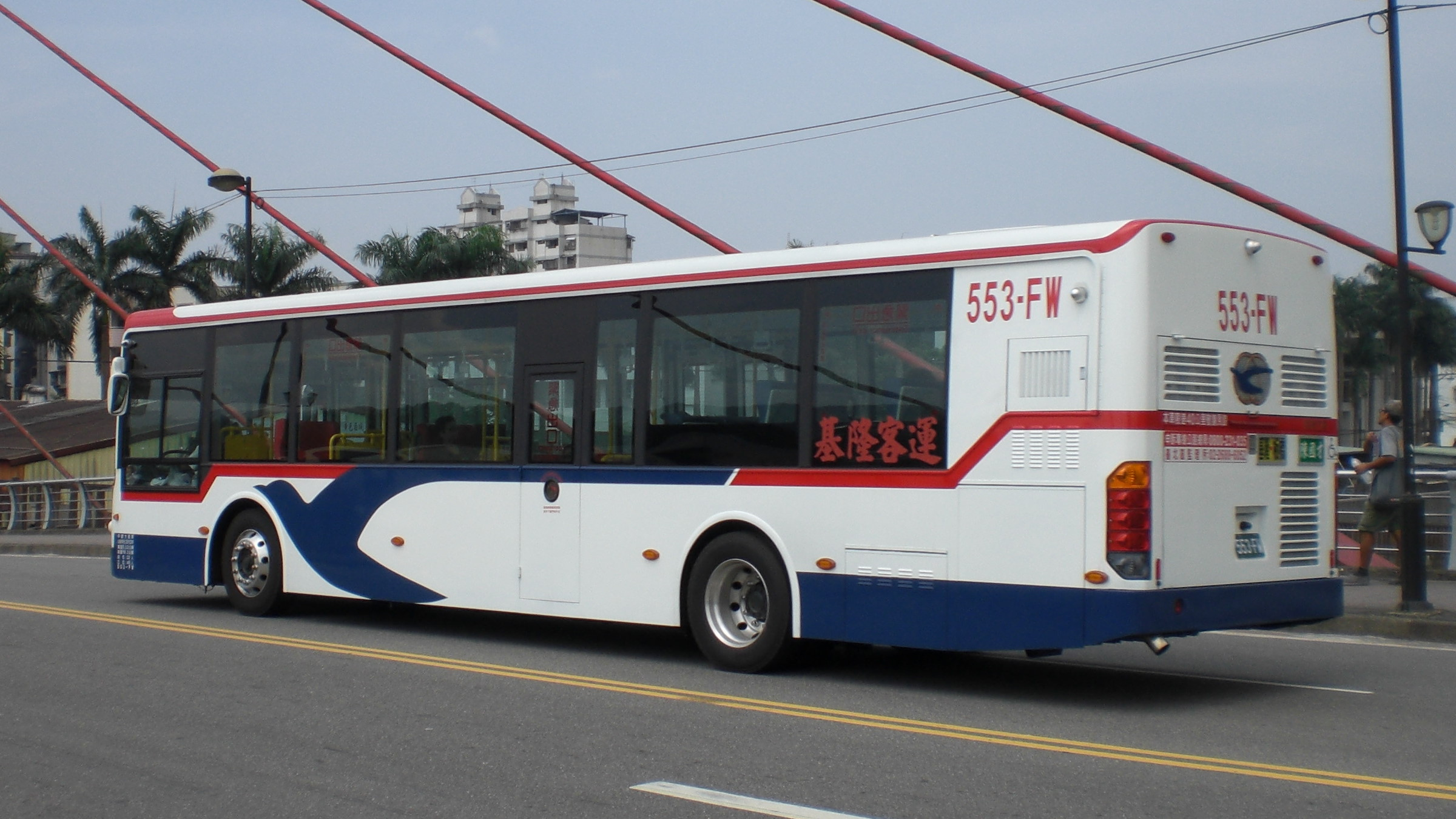 基隆客運的金龍汽車KL6120U2大客車553-FW行駛中